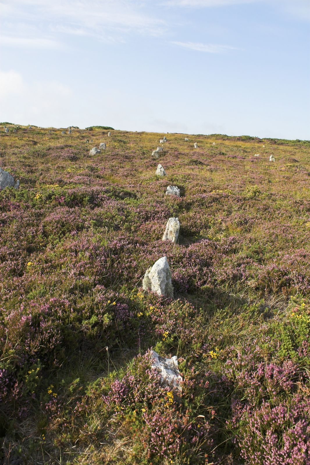 Hill o' Many Stanes, Schottland